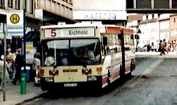 Blick auf die obere Wahmstraße